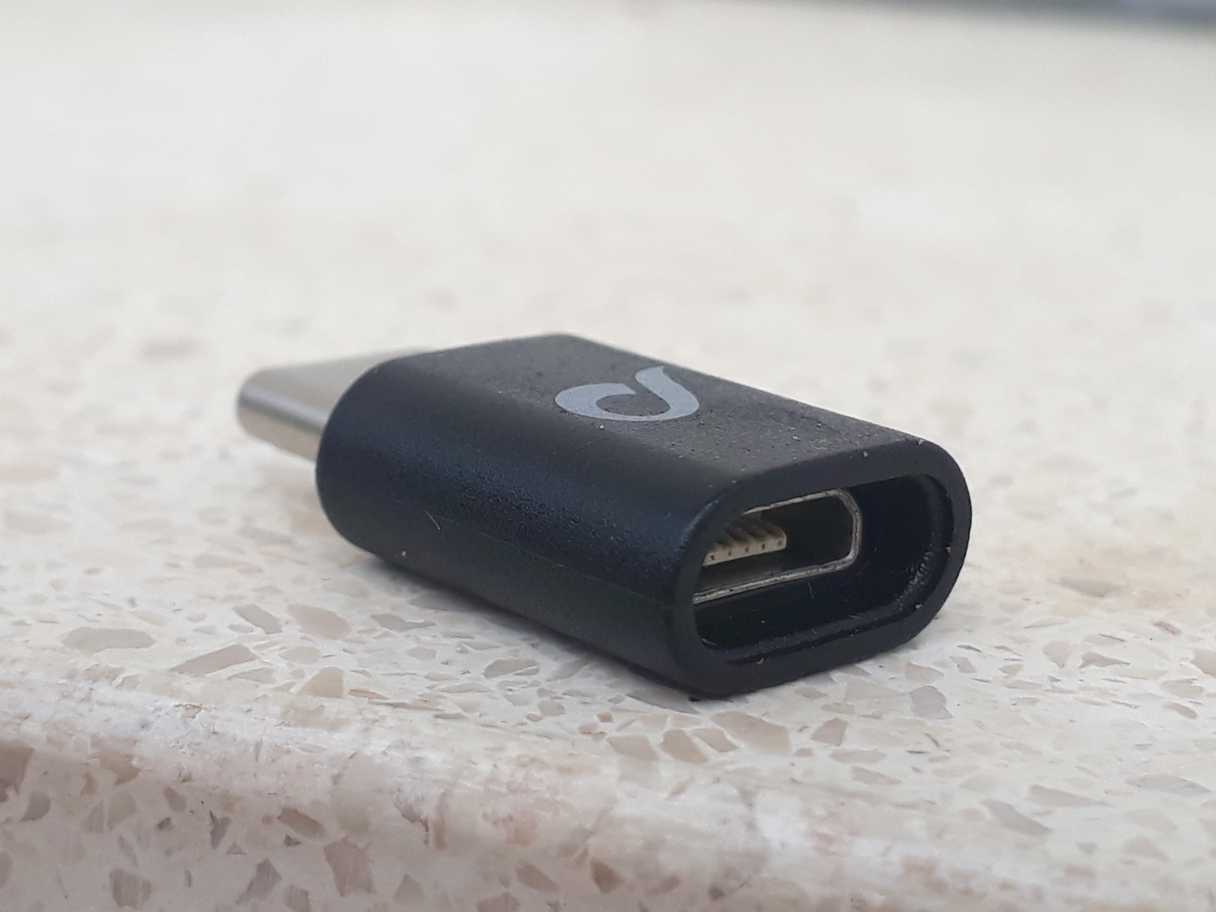 Adattatore USB (da micro a tipo-C)